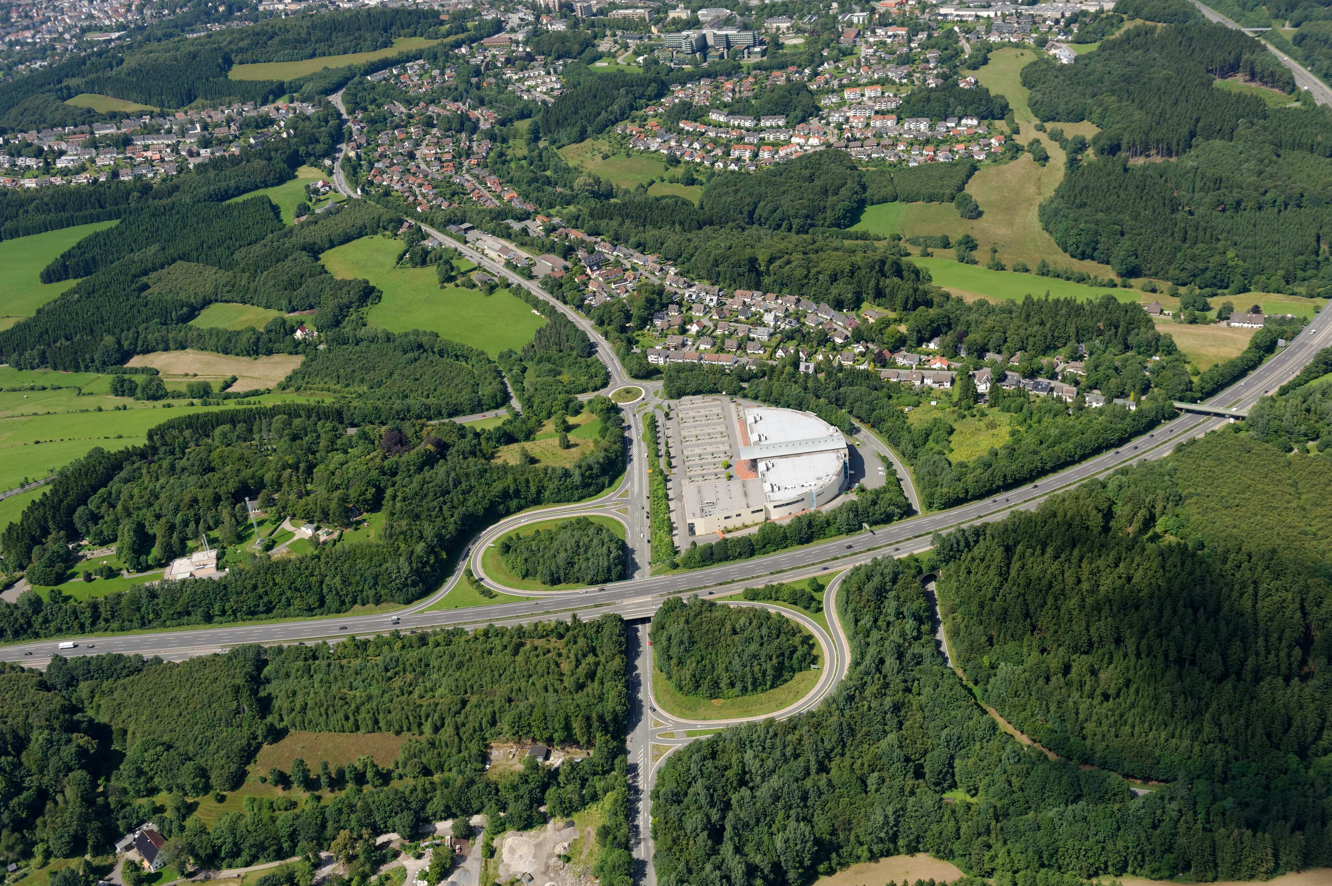 Fotoflug Sauerland West. Anschlussstelle Lüdenscheid-Süd, Unternehmen „besser wohnen Sonneborn“ an der Bundesautobahn 45; Landesstraße 561, 694 und 696; links Kommunalfriedhof Loh; vorne links Ortsteil Schwiendahl; oben Ortsteile Lüdenscheid-Bierbaum, Hellersen und Riepersloh. The making of this document was supported by the Community-Budget of Wikimedia Germany.